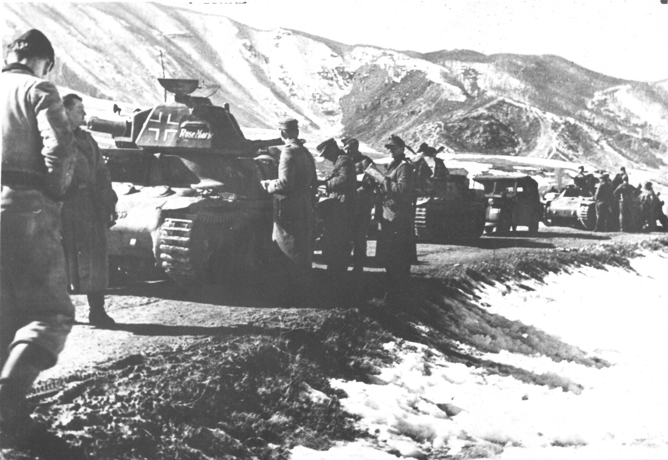 Srpskohrvatski / српскохрватски: Tenkovske jedinice nemačke 7. SS "Princ Eugen" divizije u toku bitke na Neretvi, aprila 1943.